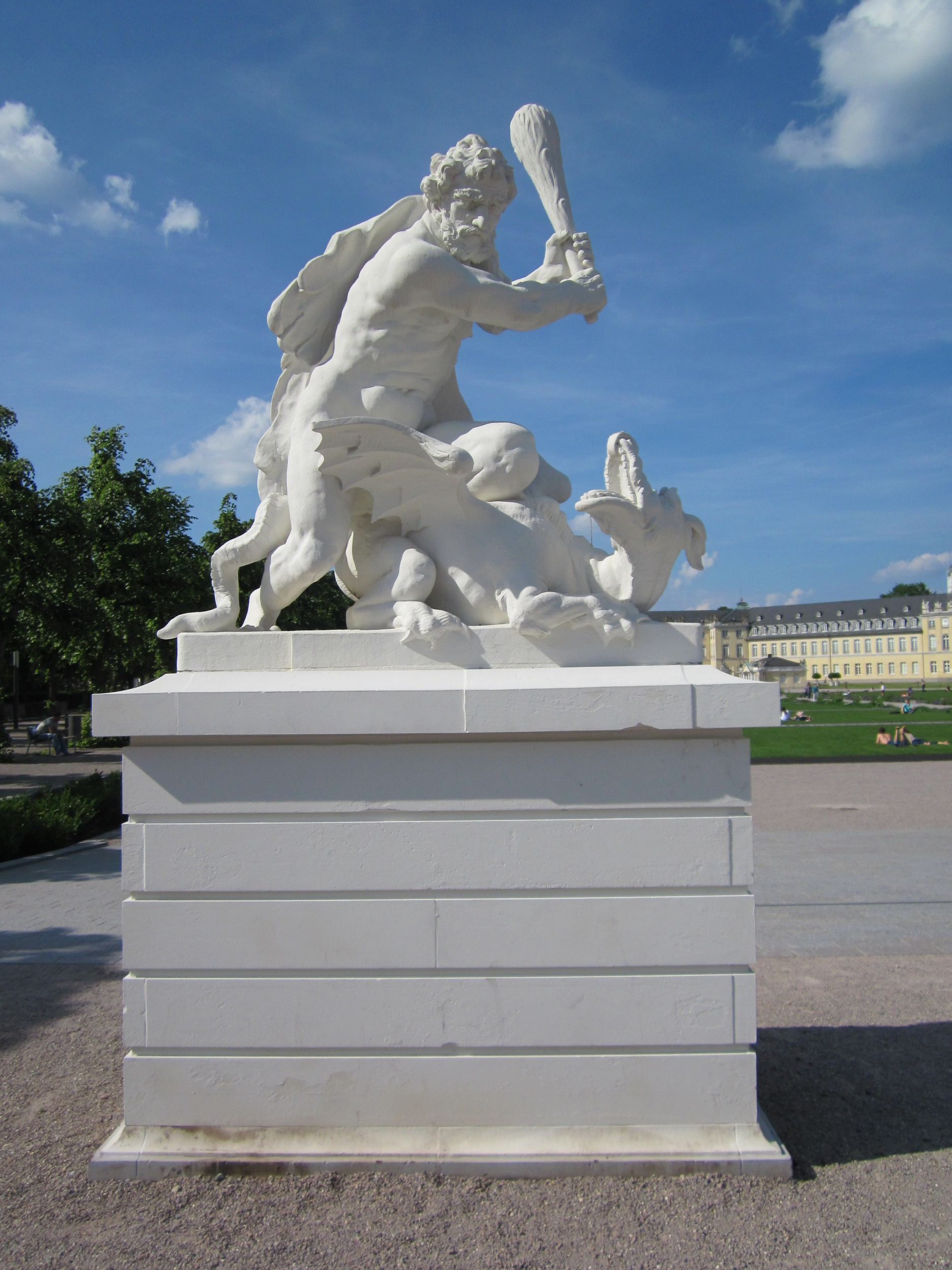 Schloss Karlsruhe